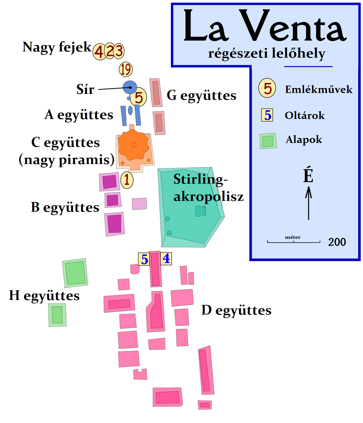 La Venta mexikói régészeti lelőhely térképe